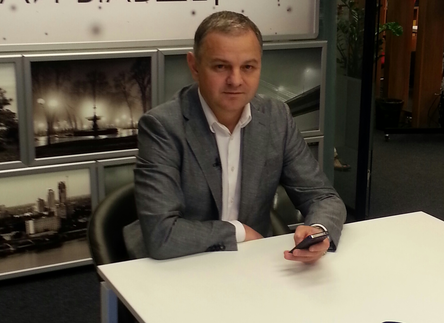 Ігор Курус